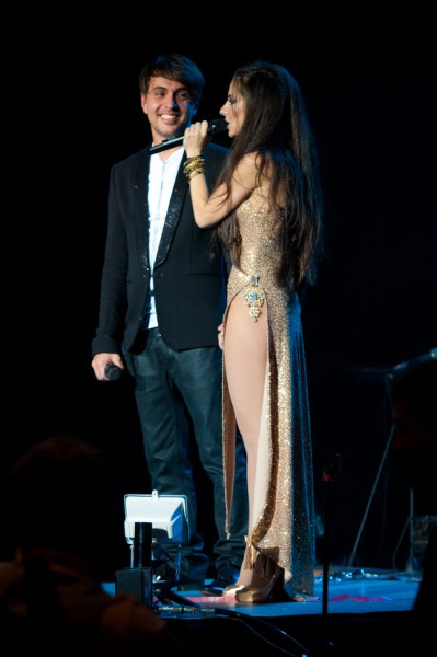 Анна Плетнёва, Алексей Романоф. Концерт группы Винтаж в Крокус Сити Холле 15 октября 2011, Москва.